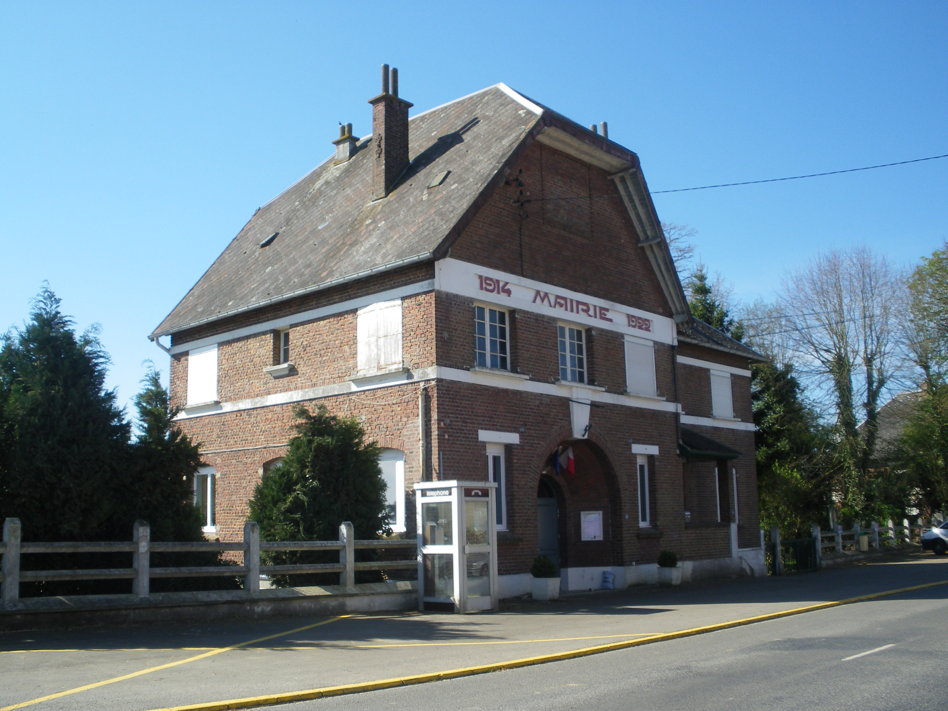 Vue de la mairie de Mory.